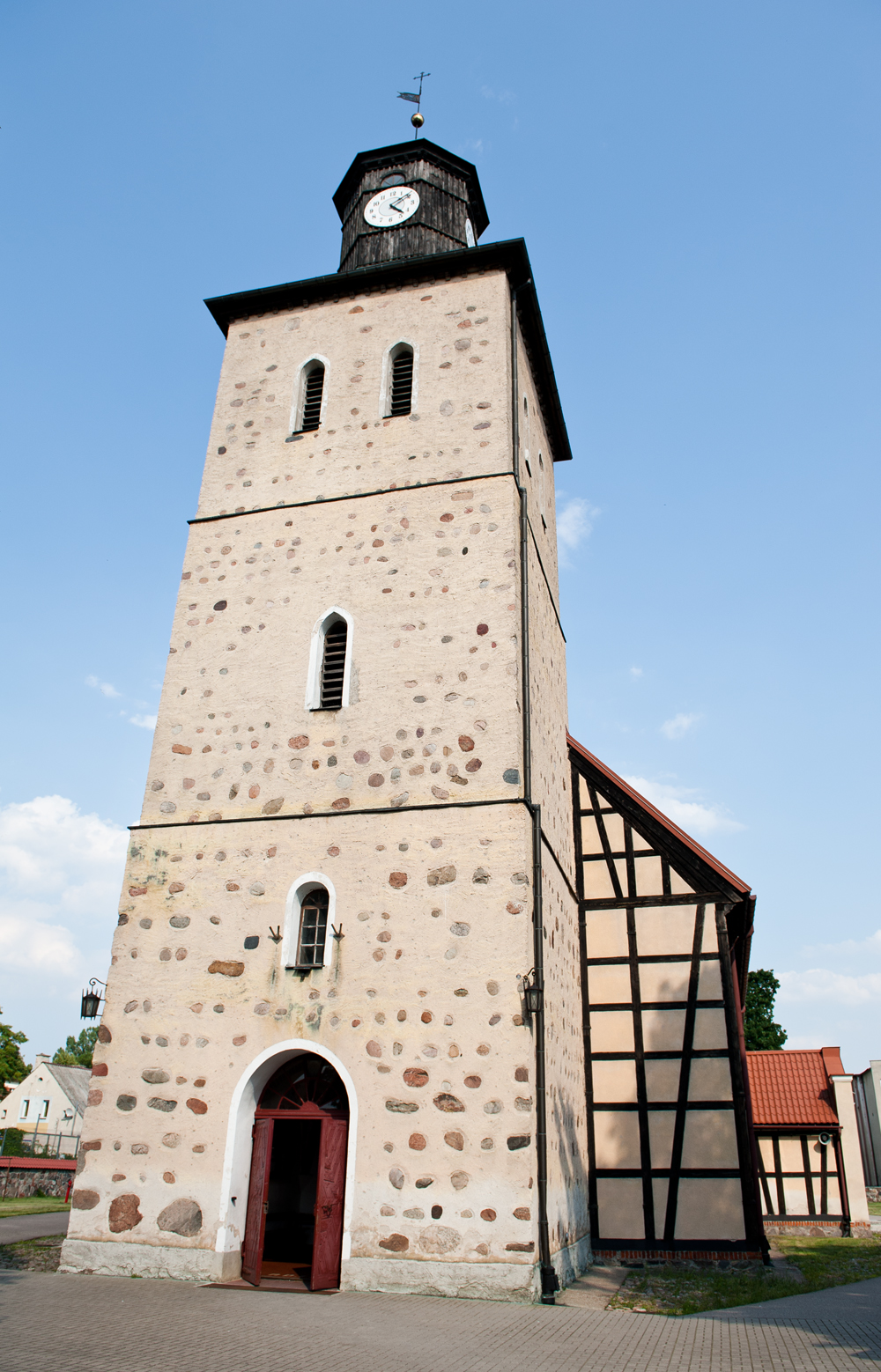 Pisz - kościół parafialny pw. św. Jana Chrzciciela (zabytek nr A-472 z dn.5.09.1958)